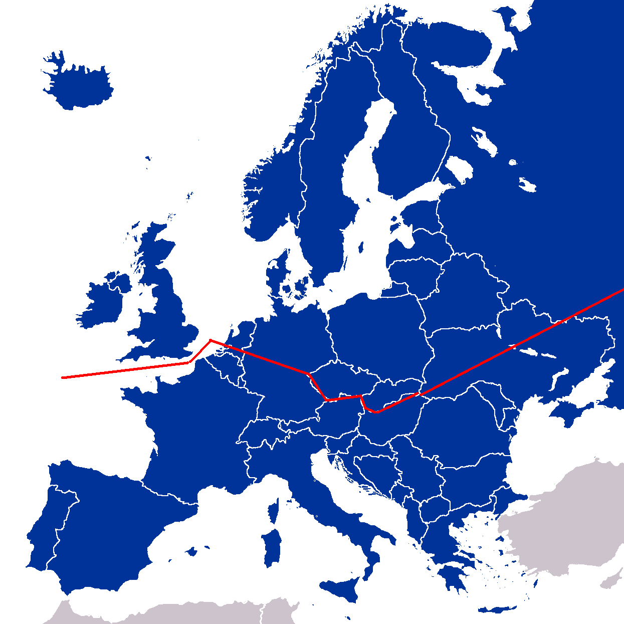 Based on Image:Europe map.png and Rugbrødsgrænsen